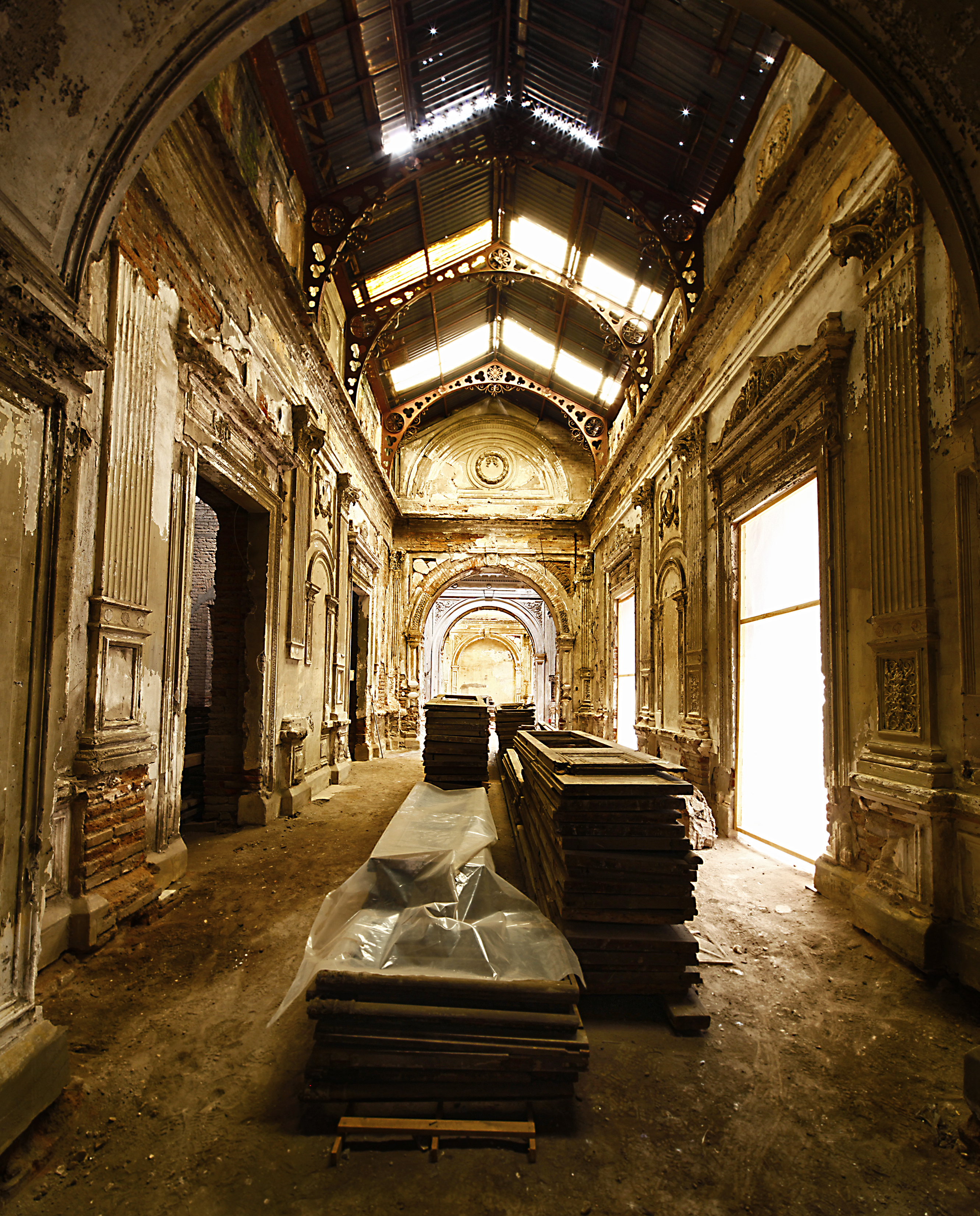 Palacio Pereira This is a photo of a national monument in Chile: 1241